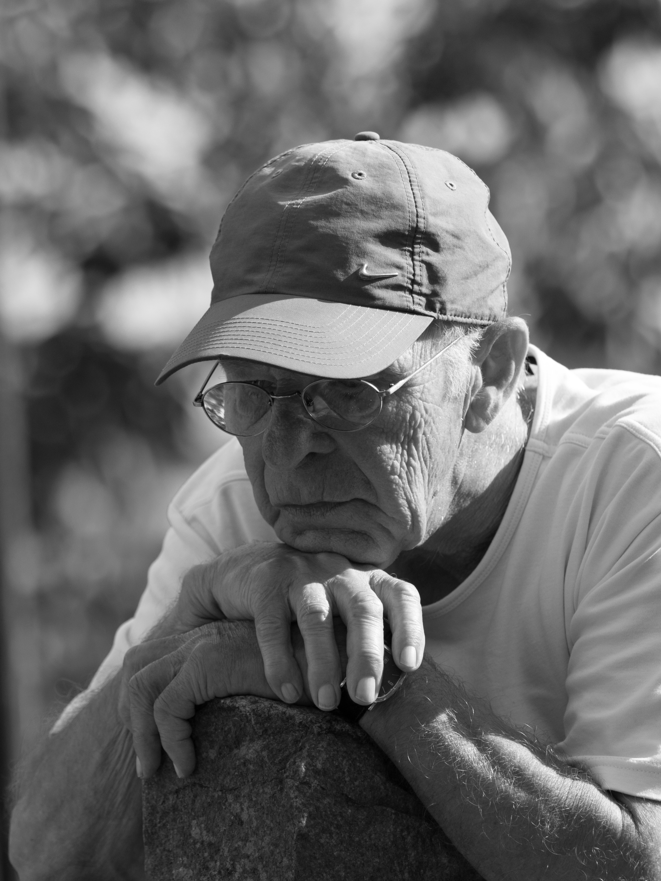 Billede af den danske maler og grafiker Finn Winge Nielsen